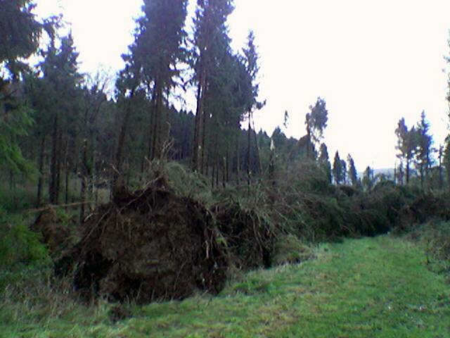 Windbruch nach Kyrill in Balve